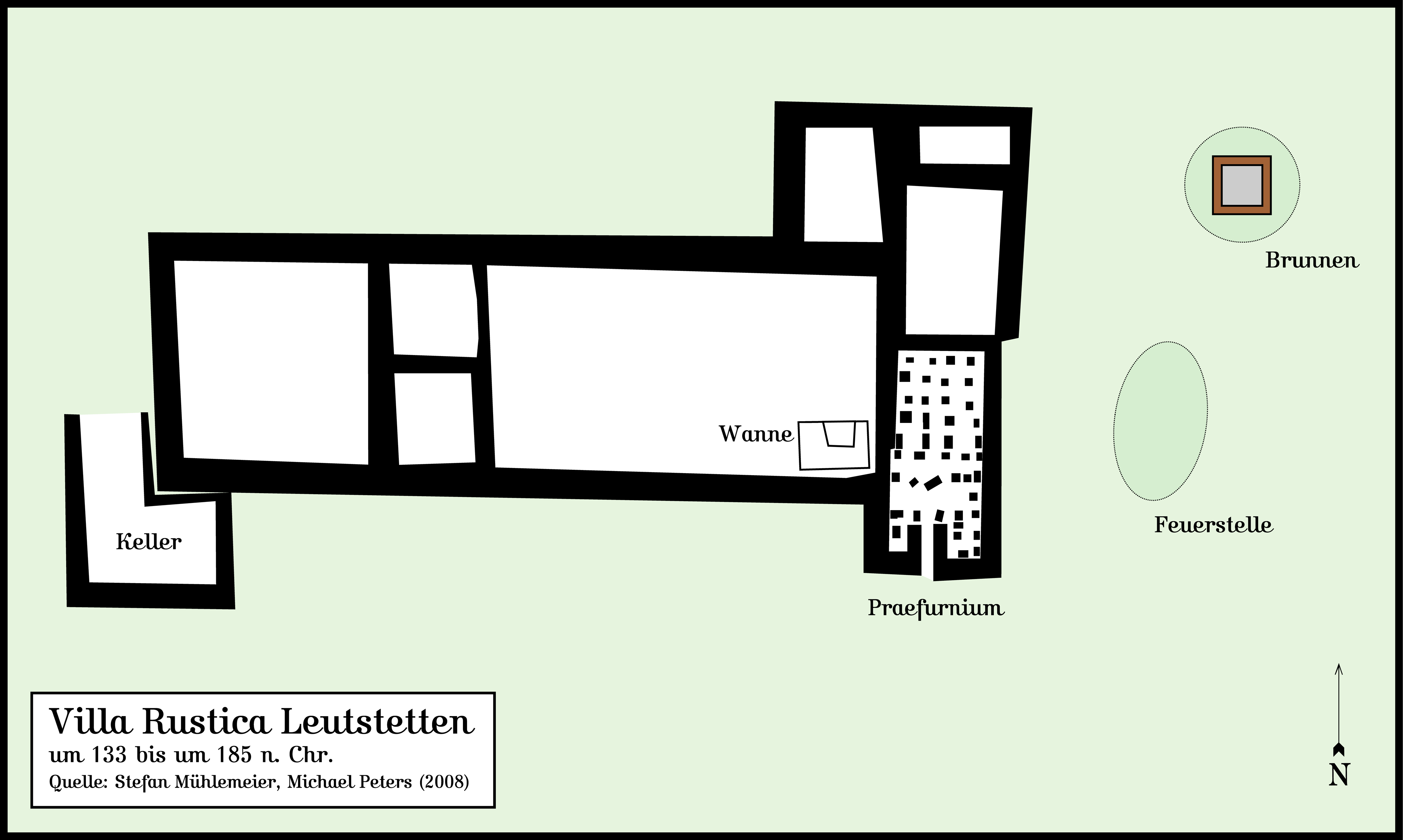 Grundriss des Herrenhauses der Villa Rustica Leutstetten, Landkreis Starnberg, Oberbayern. Quelle: Stefan Mühlemeier, Michael Peters (2008). Hergestellt am Macintosh unter Macromedia Freehand MX; abgespeichert für Wikipedia unter Adobe Photoshop CS 2.